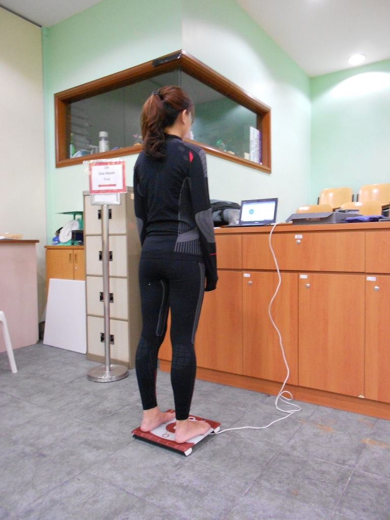 Стабилометрическая платформа в пулевом спорте